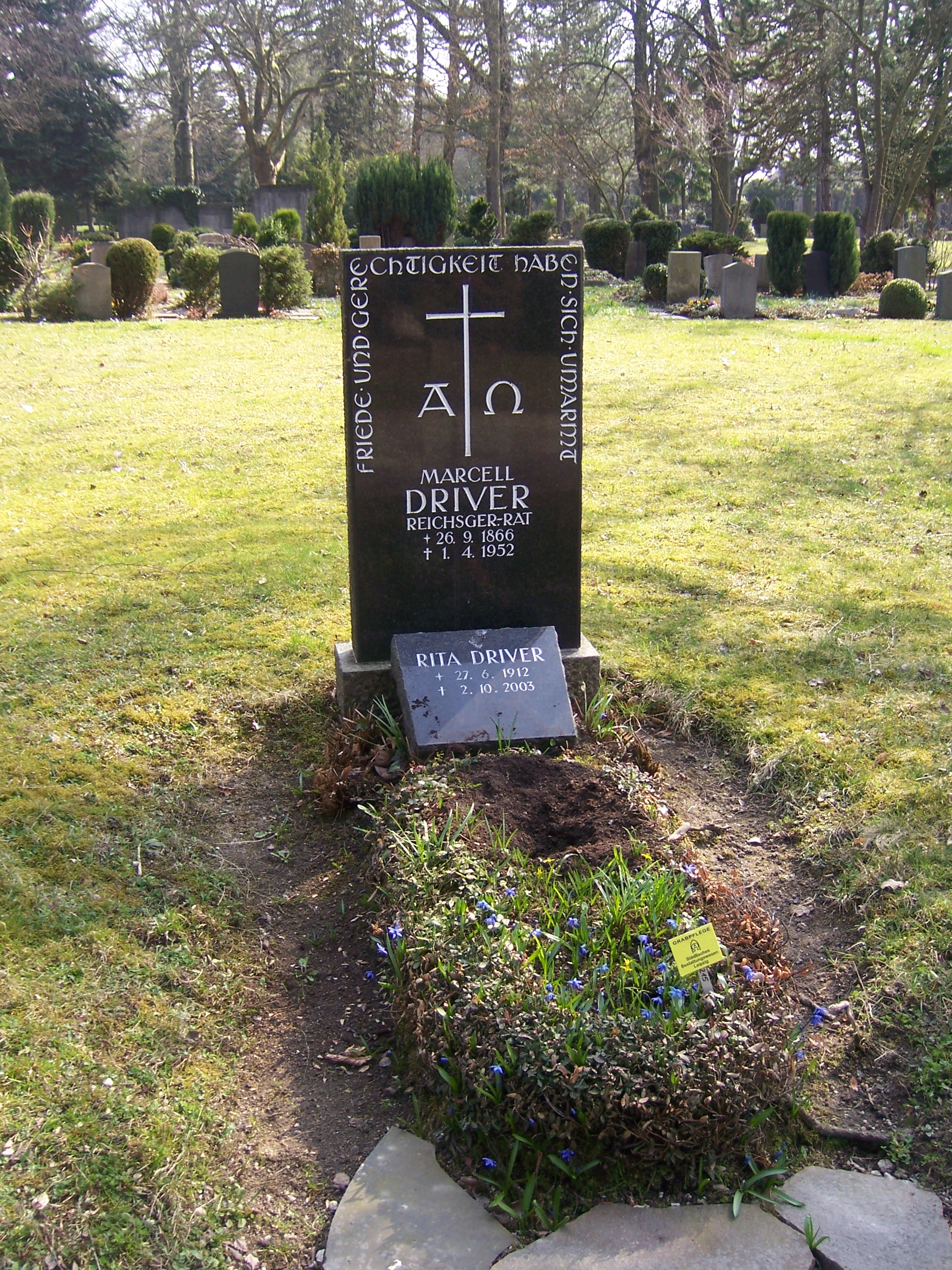 Grabmal des Reichsgerichtsrats Marcell Driver